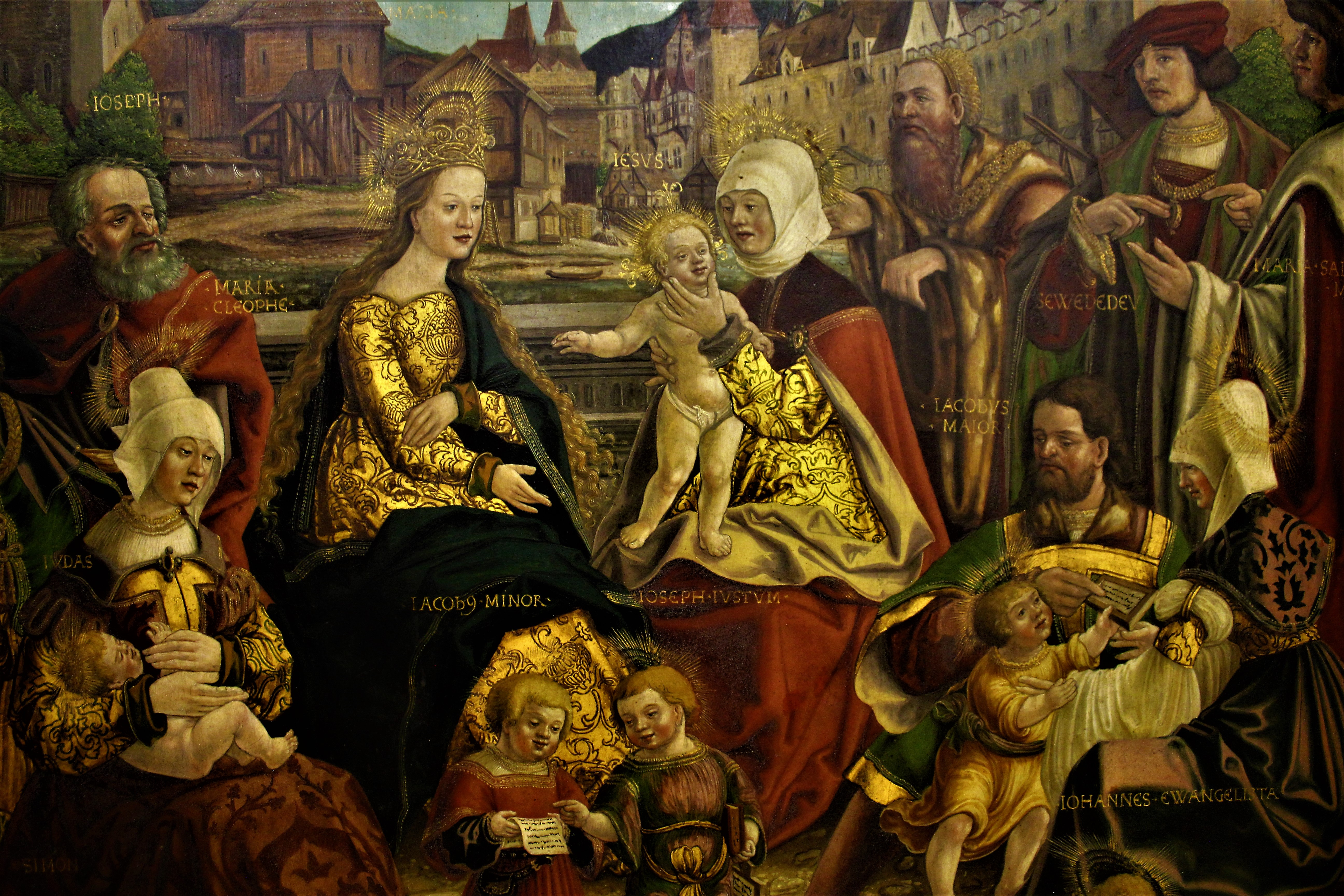 Ausschnitt des Mittelbildes vom Annenberger Altar, gemalt 1517 von Michael Scheel. Er zeigt Maria, das Jesuskind und weitere Mitglieder der Familie, der "Heiligen Sippe".